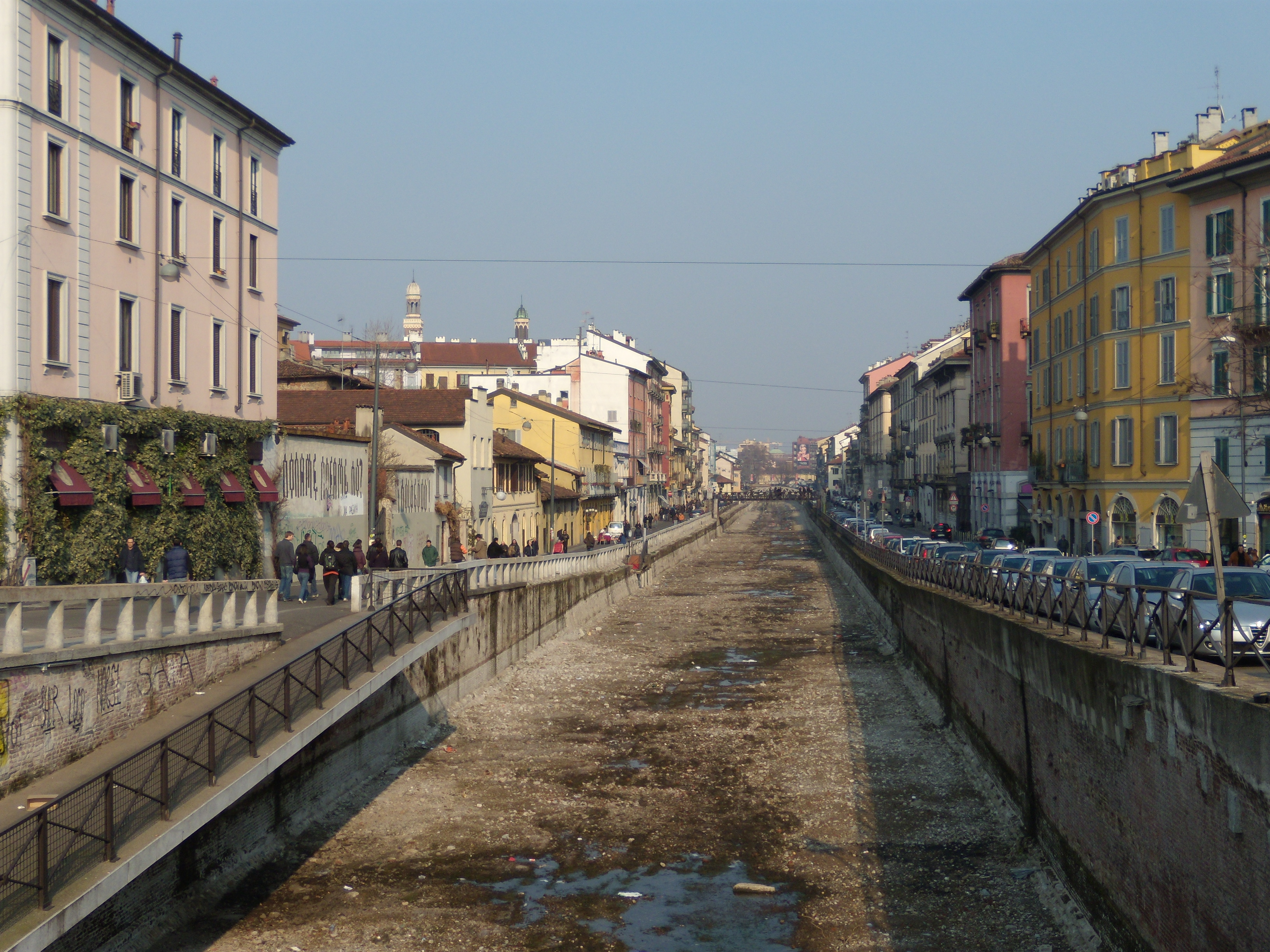 Il Naviglio Grande in secca primaverile, ripreso dal ponte di via Valenza.